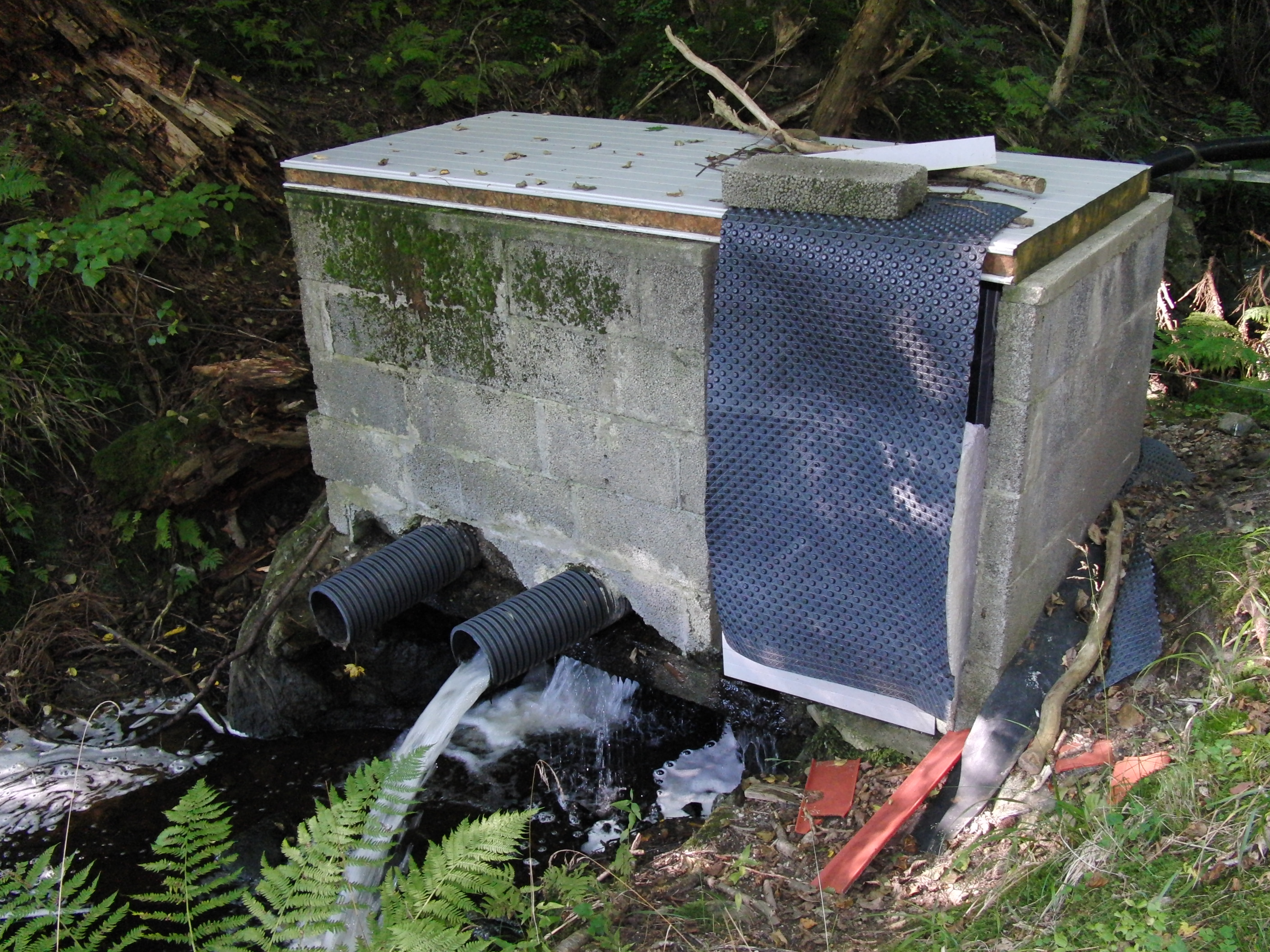 Frøvik gård kraftverk